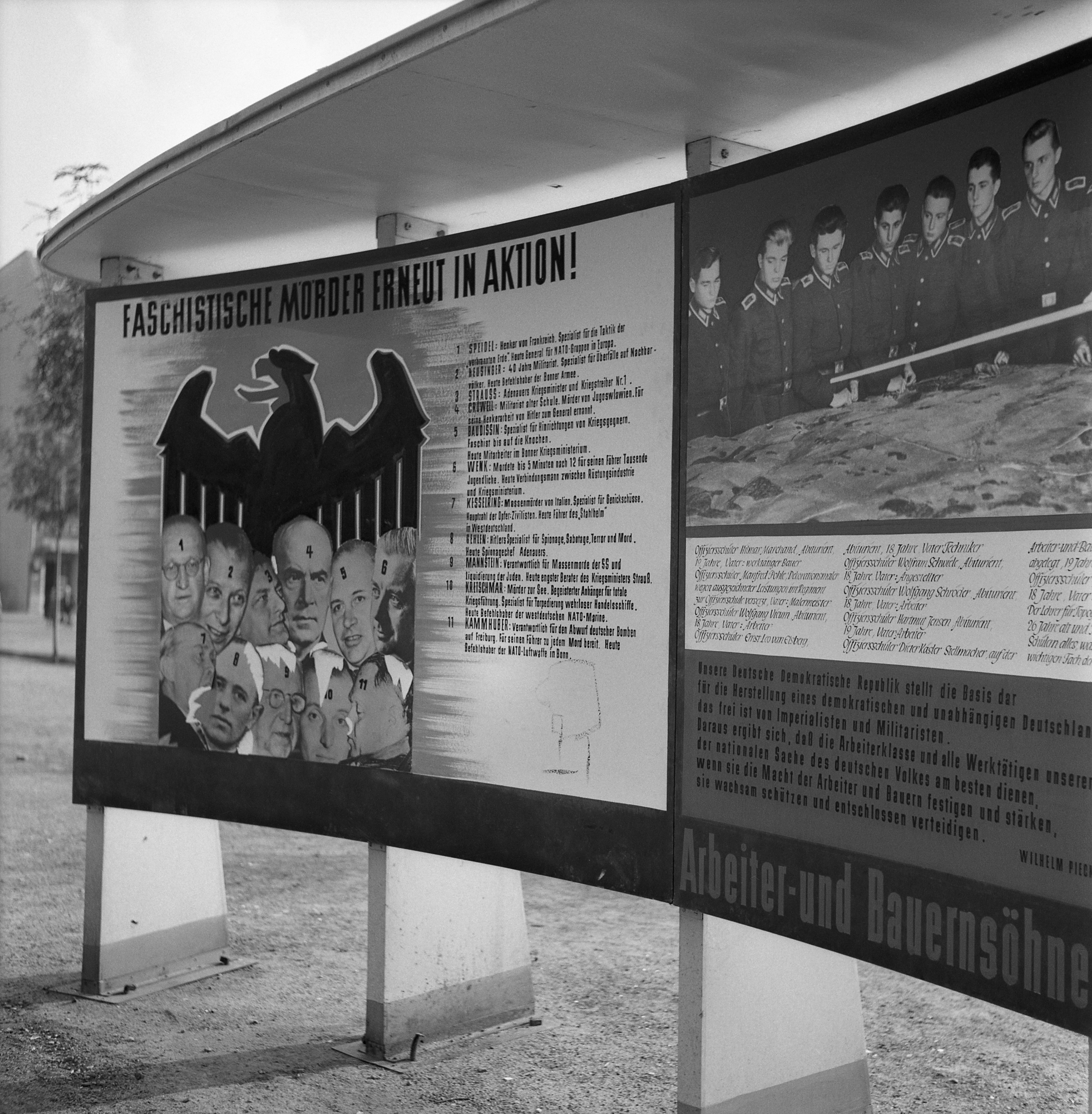 Propaganda gegen Altnazis im Westen, Berlin 1957